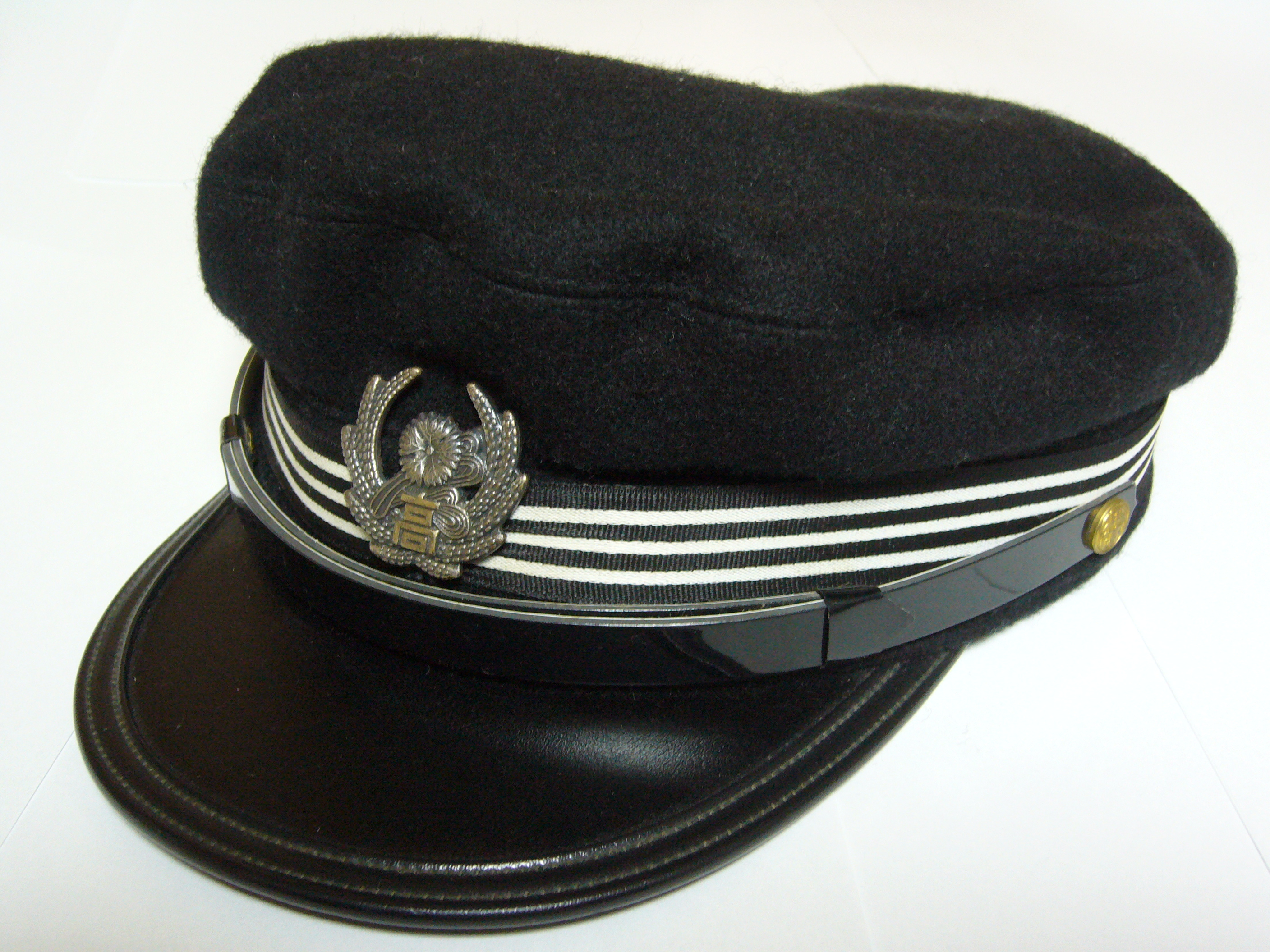 鹿児島県立甲南高等学校男子学生帽